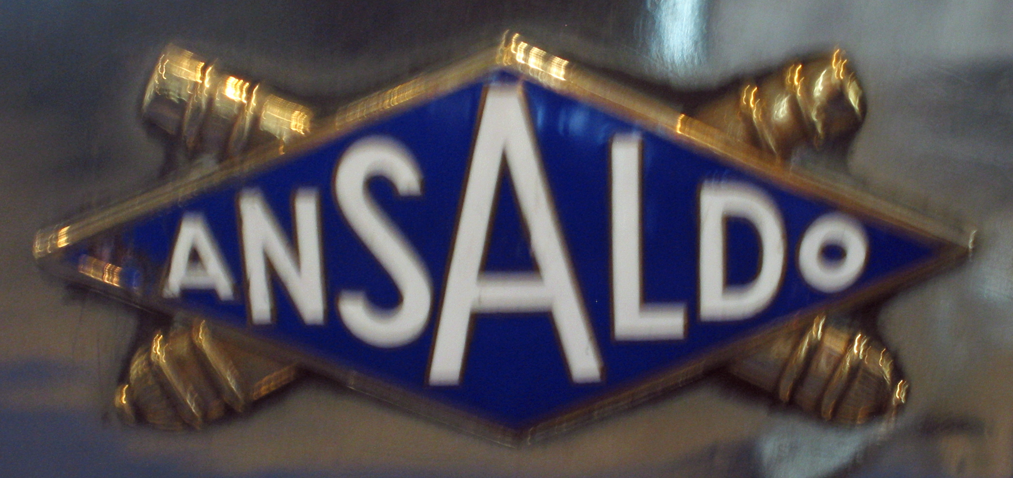 Emblem Ansaldo